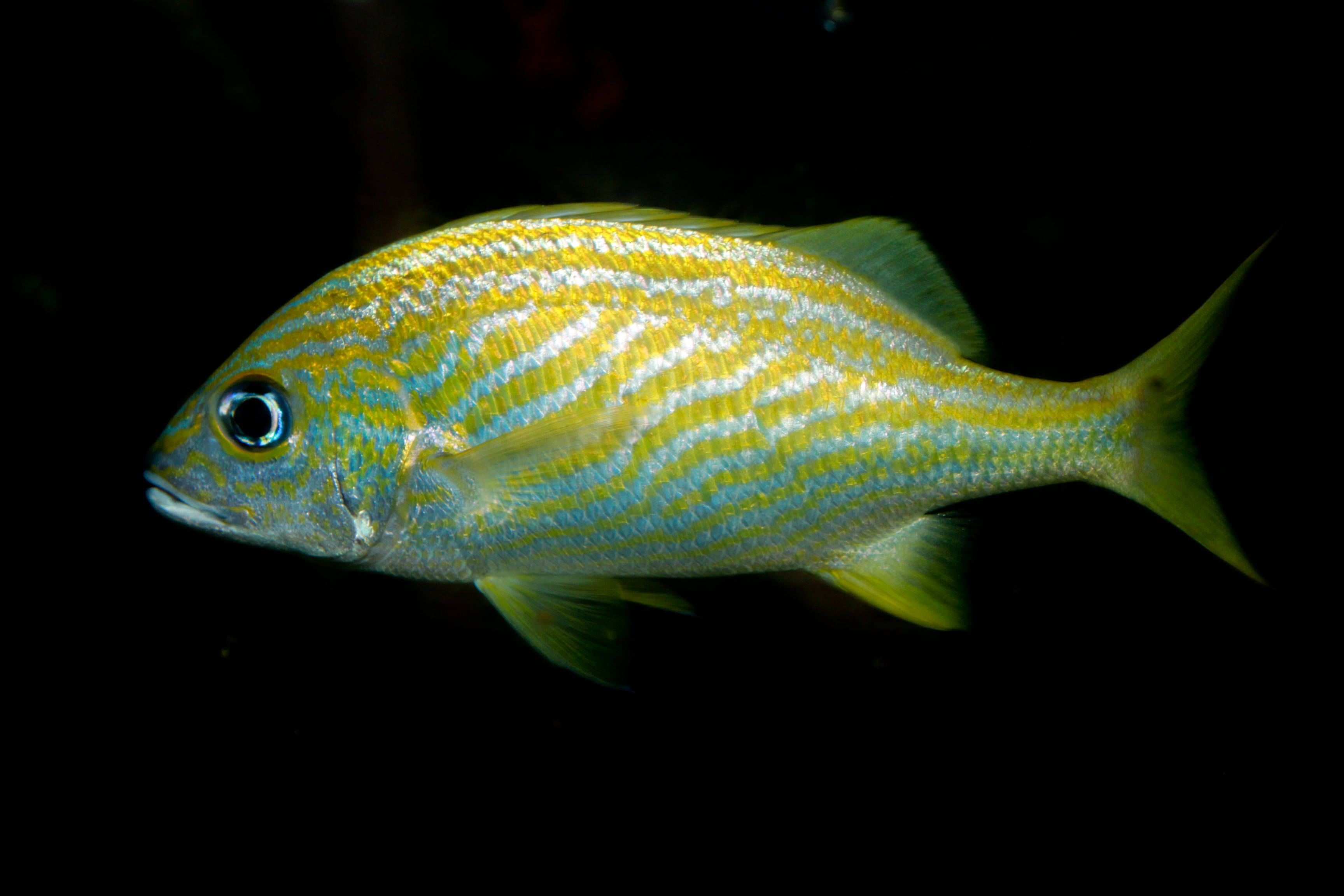 Haemulon flavolineatum French grunt